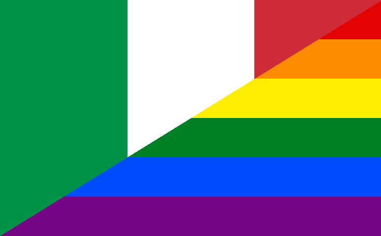 Bandera gay Italia.